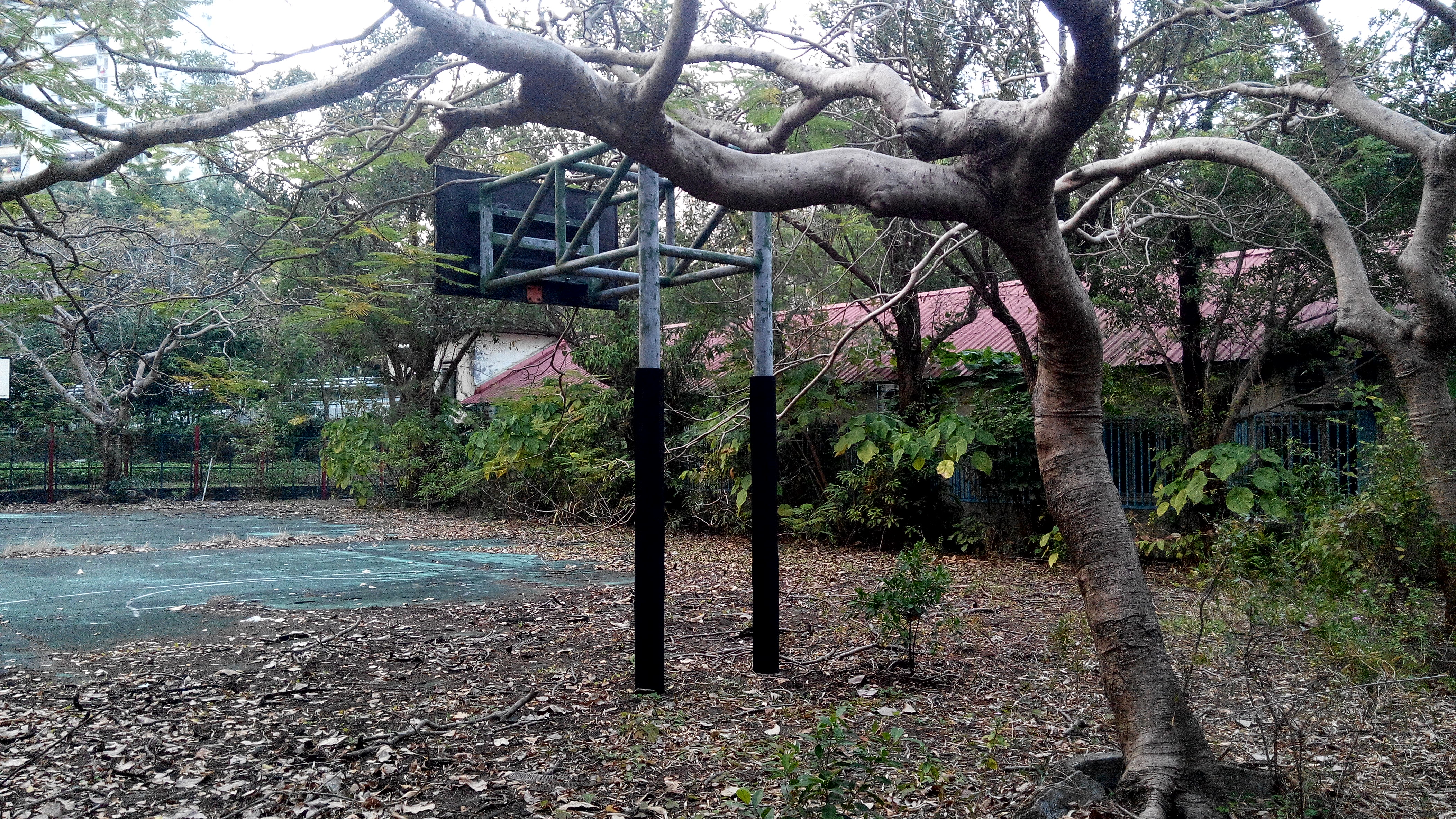 田料學校